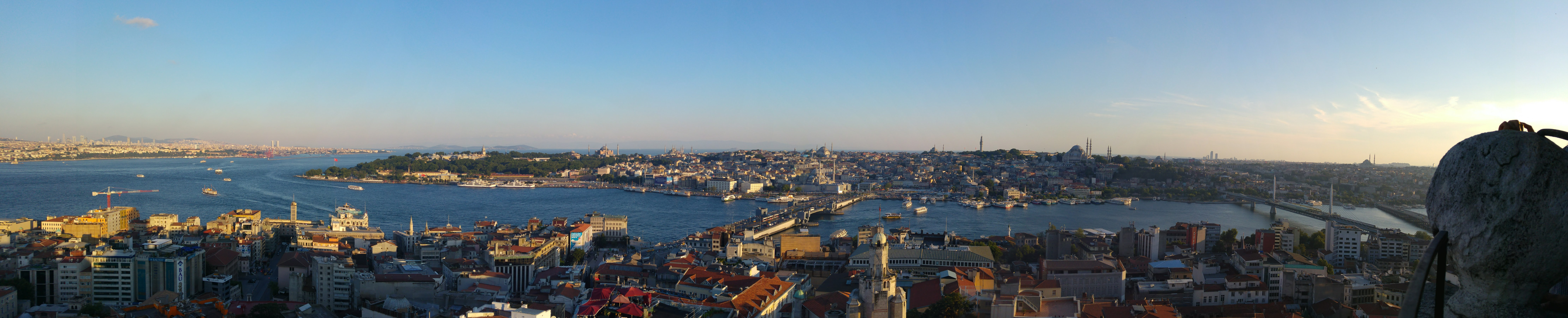 Vista panorámica del cuerno de Oro de Estambul, Turquía desde la Torre Galata